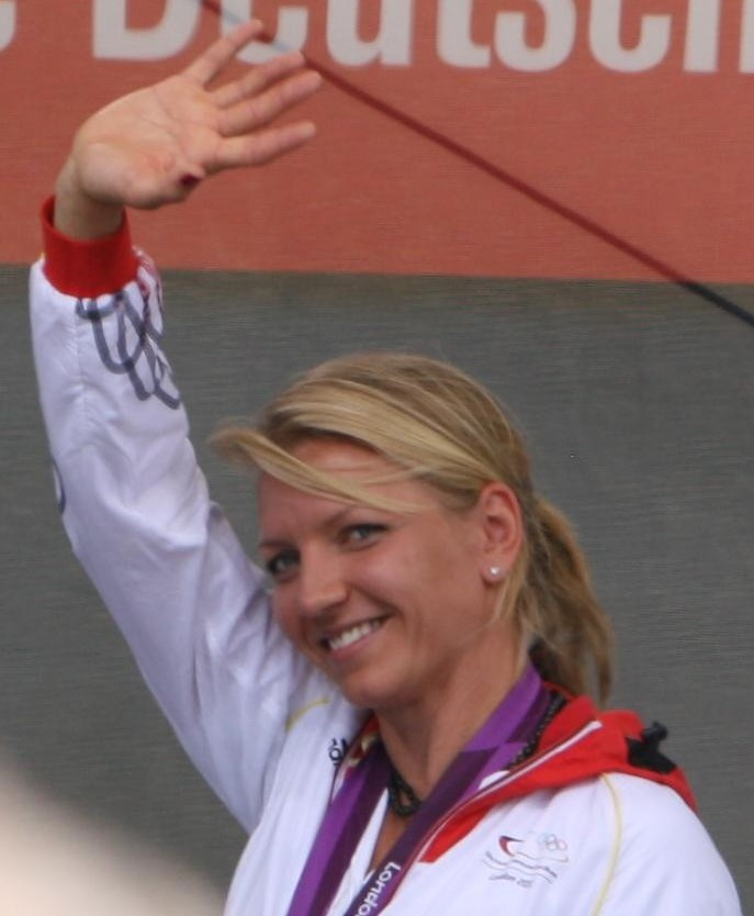 Lilli Schwarzkopf beim Empfang der Olympioniken 2012 in Hamburg